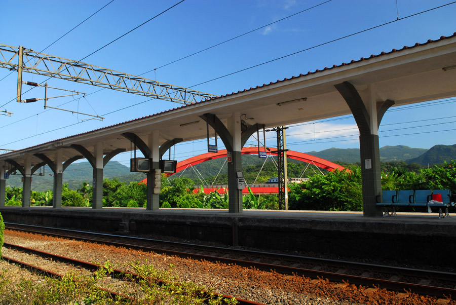 臺灣鐵路管理局宜蘭線貢寮車站。